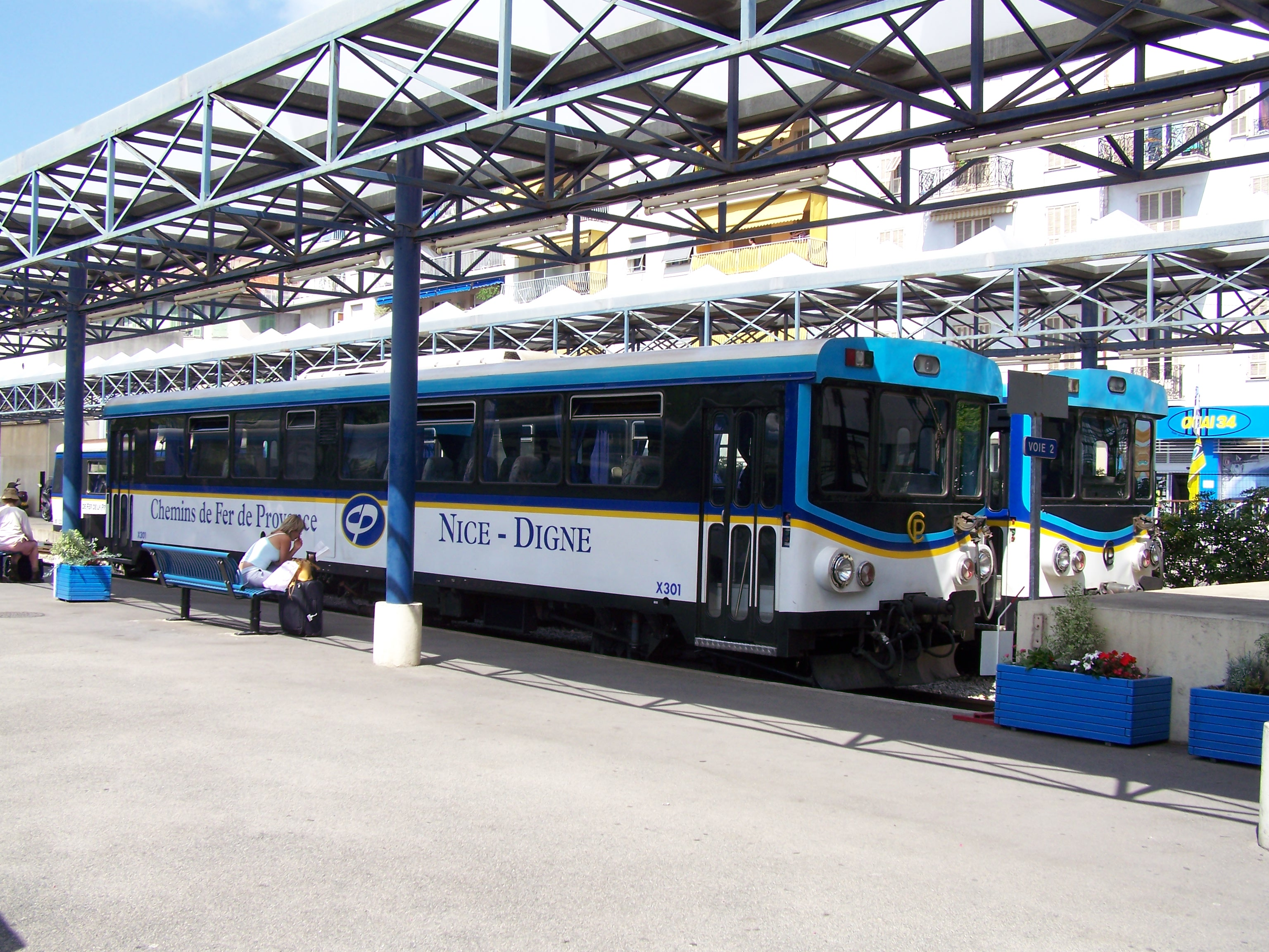 Autorail X301 des Chemins de fer de Provence au terminus de Nice (Alpes-Maritimes, France).